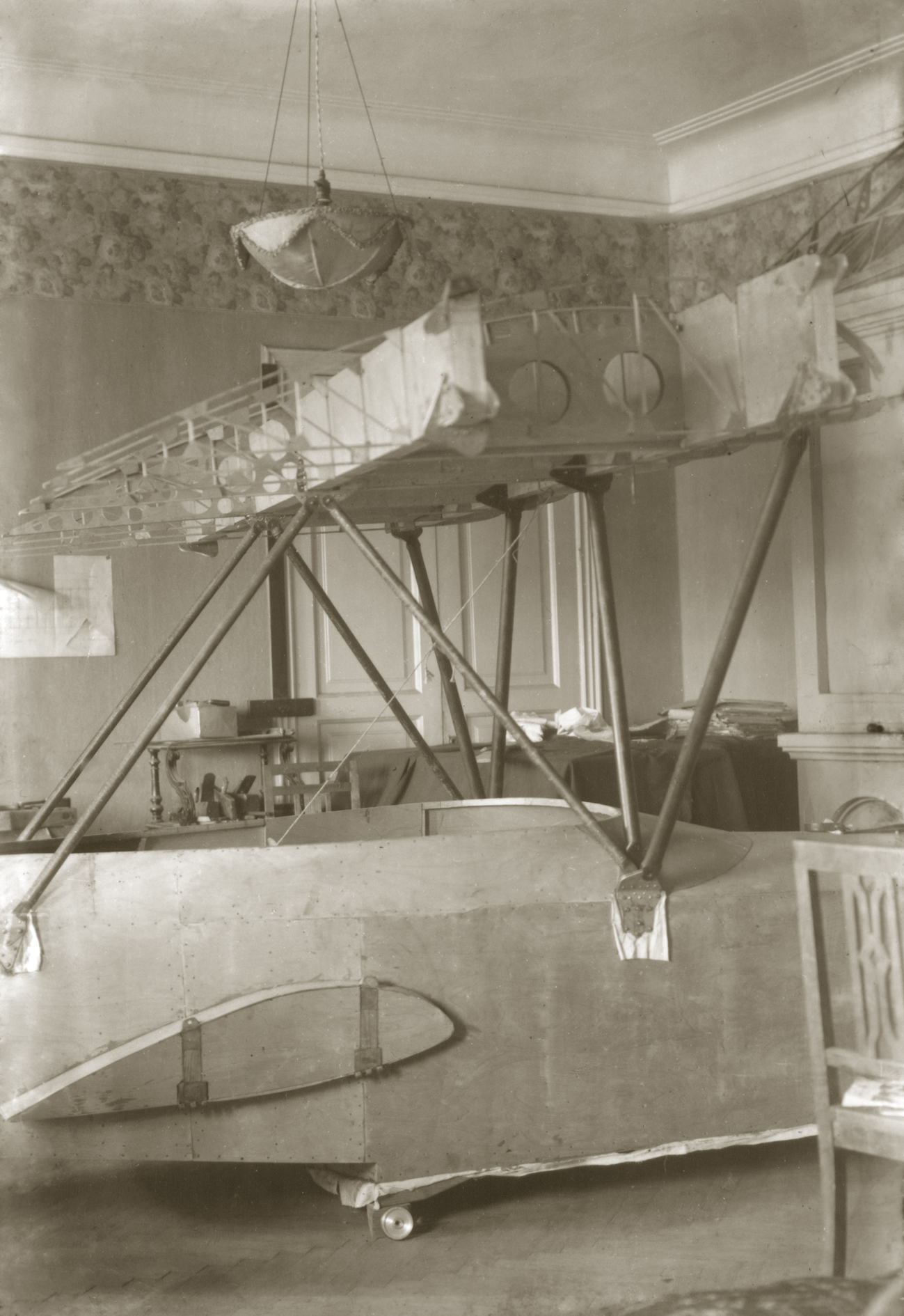 Строительство Ш-1 в квартире Корвин-Кербера